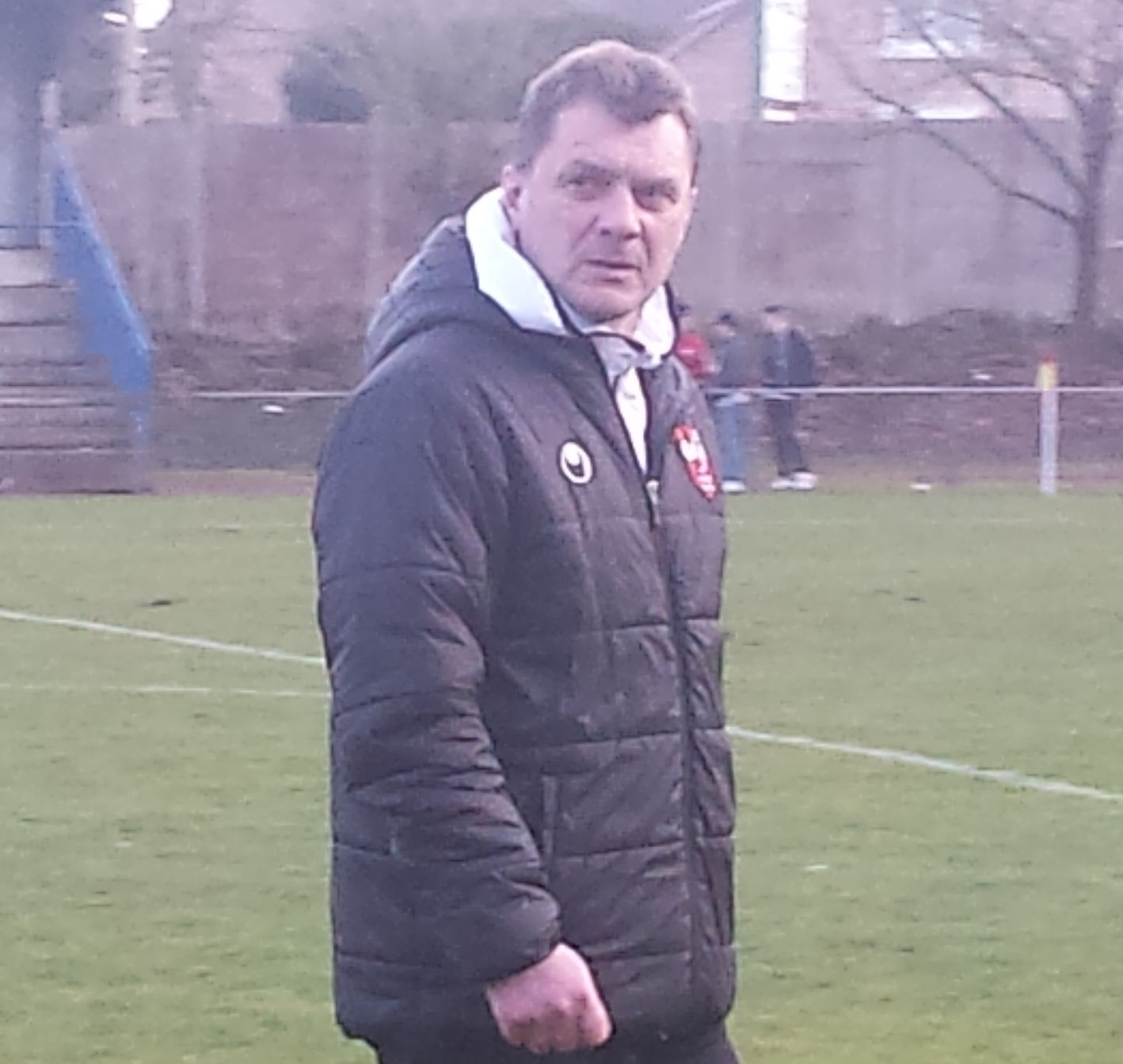 Jean-Luc Girard après le match RC Lens / US Ivry, comptant pour la quatorzième journée du championnat de CFA (quatrième division française) - Match en retard -, le 11 mars 2015 au Stade François-Blin d'Avion.